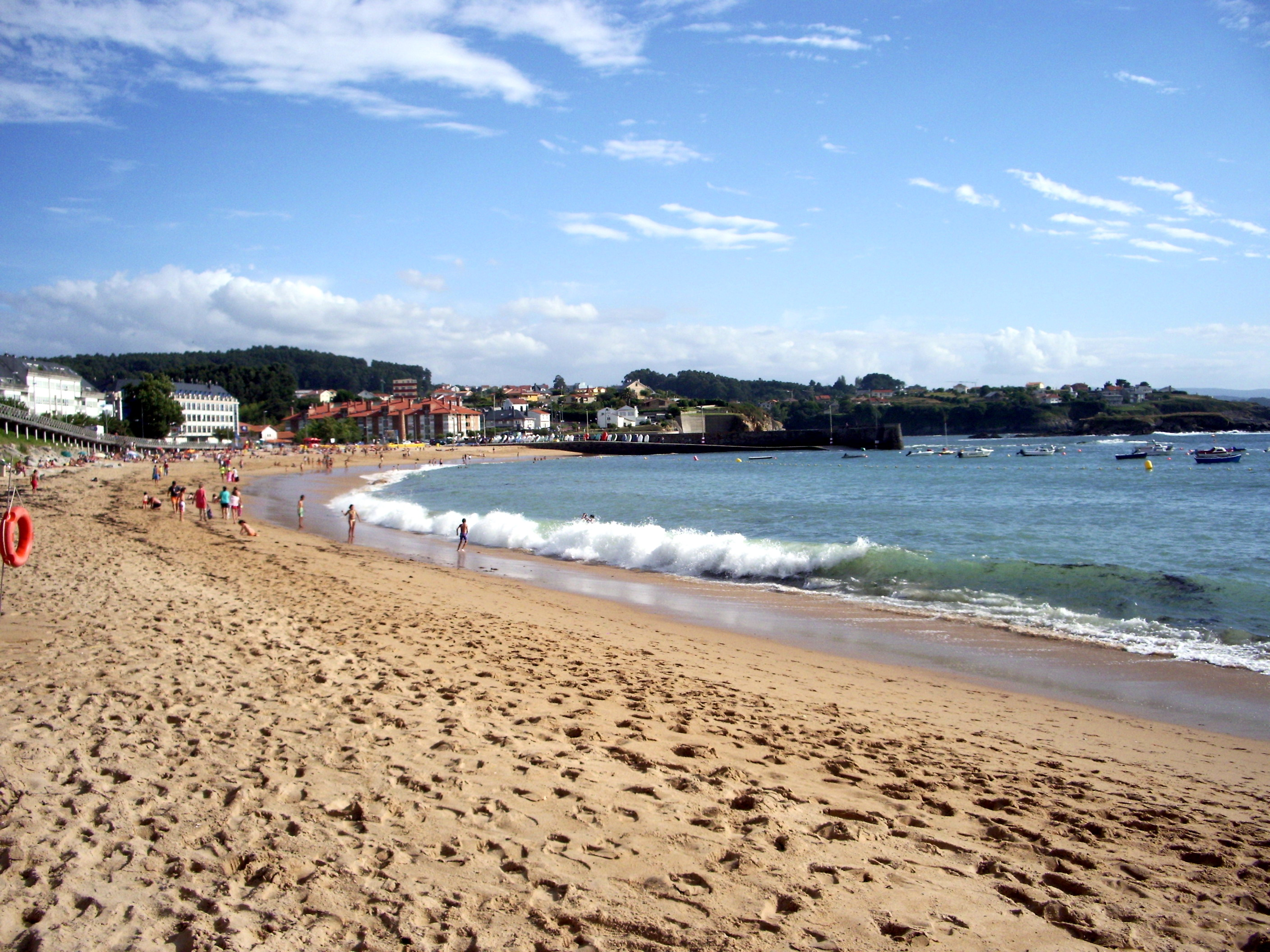 Playa de Mera